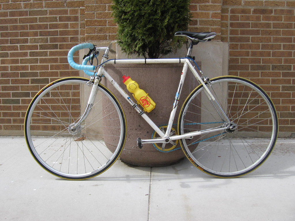 74 Gitane Tour de France